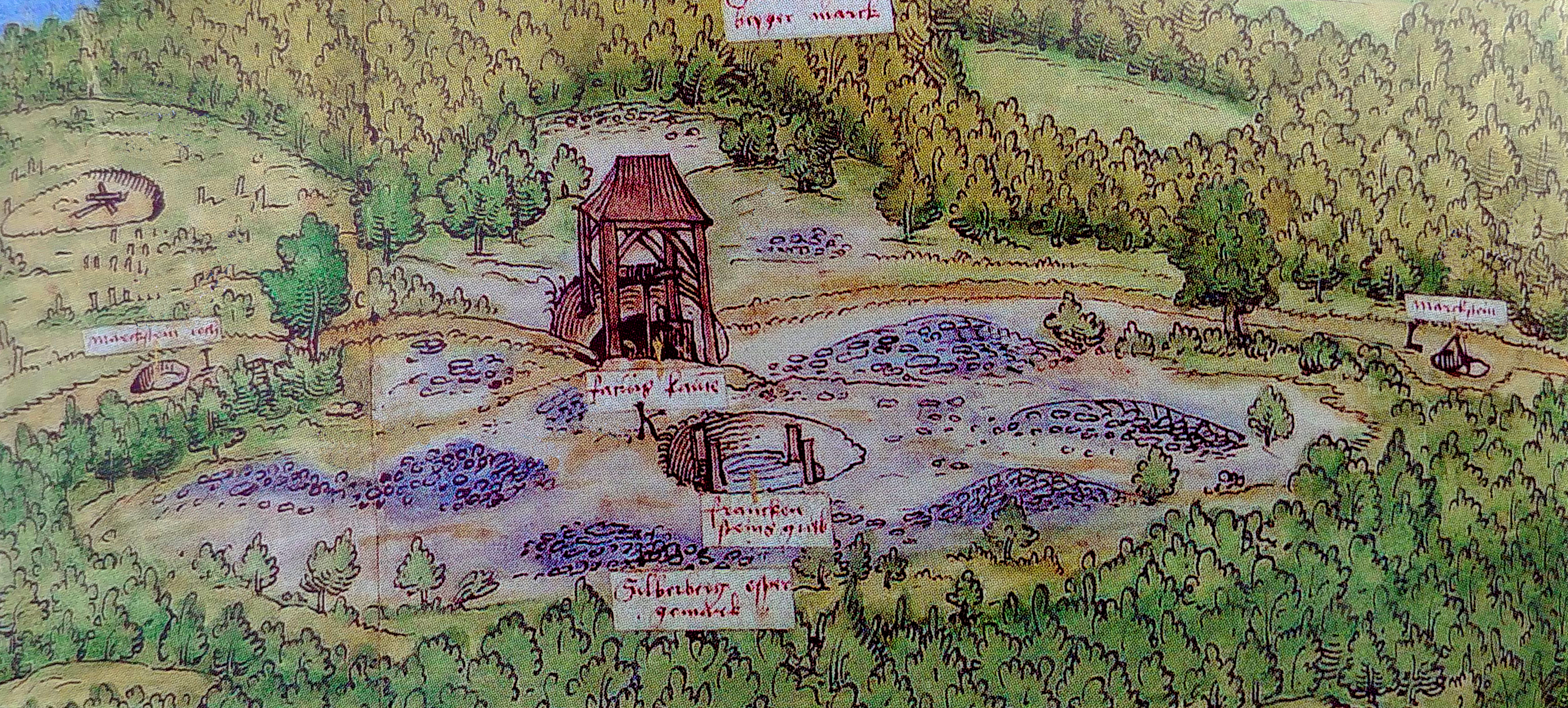 Grube Silbersegen. Darstellung von 1544. Zu sehen sind die Tagesanlagen der Grube Silbersegen auf dem Silberberg (Gaulskopf). Das Schachthaus markiert die Position des Gerichtschachts. Die Gemarkungsgrenze zwischen Espa und Cleeberg ist als schmaler Weg eingezeichnet und verläuft von rechts durch die Bildmitte, direkt am Gerichtschacht vorbei und weiter nach links. Zur Präsentation vor Gericht wurden kleine Papierstücke mit Hinweistexten aufgeklebtː ̟Linker und rechter Bildrand, auf der Grenzeː Texte "Marckstein" (Grenzstein) Oberer Bildrandː Text "Silberberg Kleberger mark" (Gemarkung Kleeberg) Unterer Bildrandː Text "Silberberg Esper gemark" (Gemarkung Espa) Bildmitte, am Schachthausː Text "Farung Kauthe" (Fahrschacht), später umbenannt in Gerichtschacht Bildmitte, zweiter Schacht ohne Schachthausː Text "Frankenstein Gudt" (Besitz derer zu Frankenstein), dieser Schacht ist in der großen Schachtpinge des Gerichtschachts aufgegangen. Diese Abbildung ist ein Ausschnitt vonː